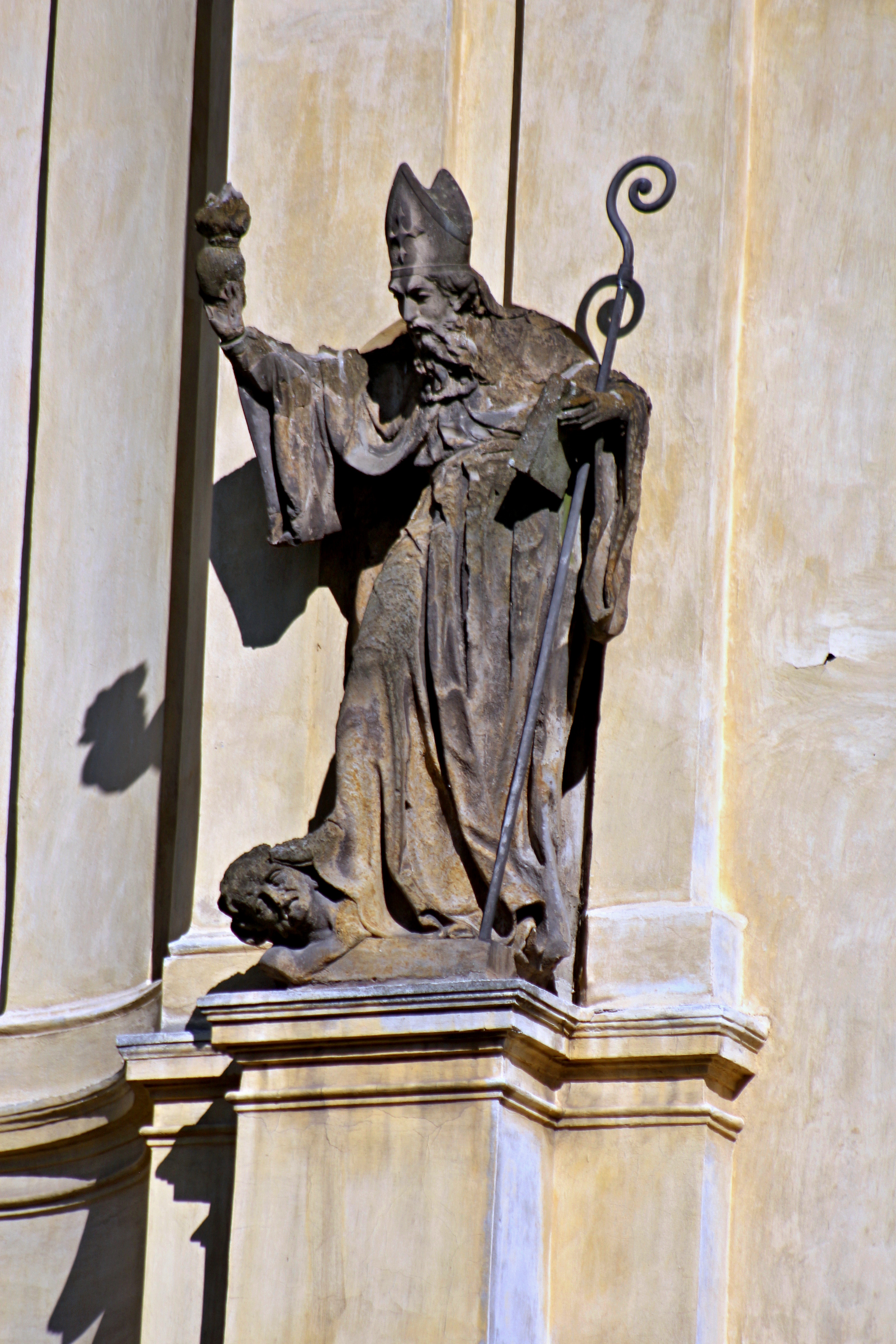 Klášterní kostel Narození Panny Marie v Dolním Ročově